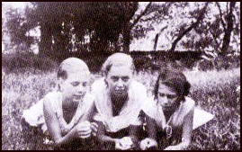 Foto del año 1934 "recorte de una publicación de un diario o revista de la época" Imagen familiar inspiradora de la marca "Las Tres Niñas" de la Empresa Láctea y otros, Kasdorf de Argentina.